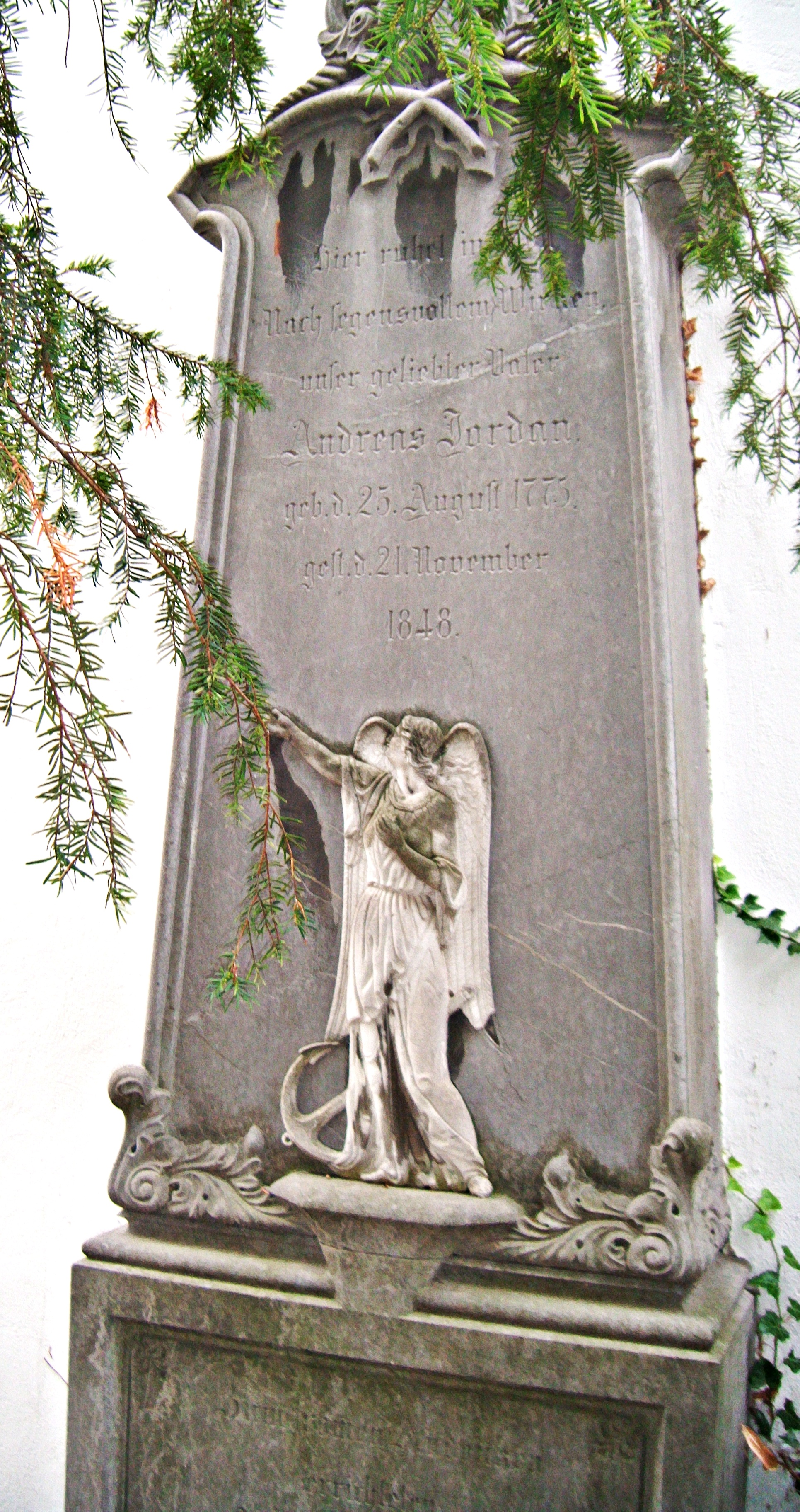 Andreas Jordan (1775-1858), bayerischer Landtagsabgeordneter und Weingutsbesitzer, Grabstein, Friedhof Deidesheim